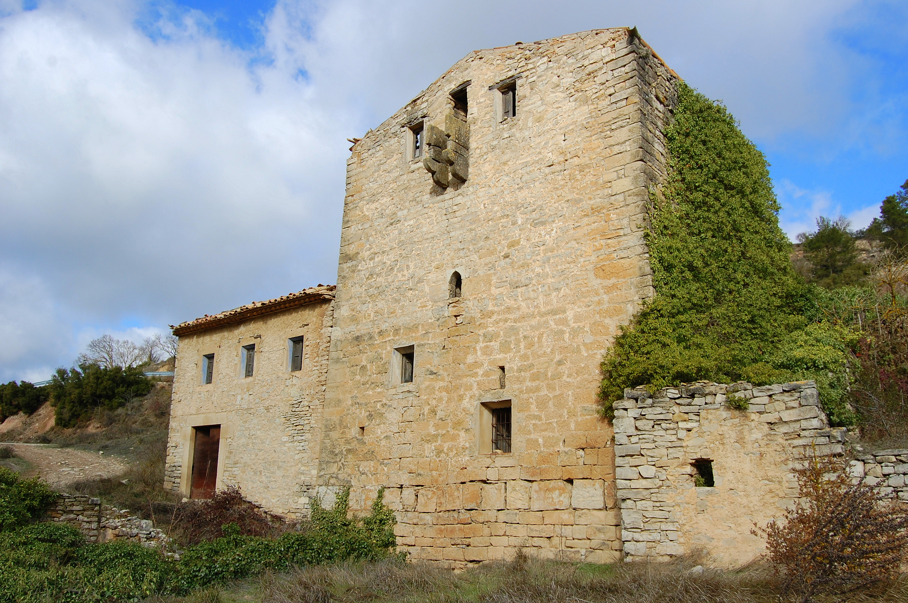 Molí d'Albió (Llorac)